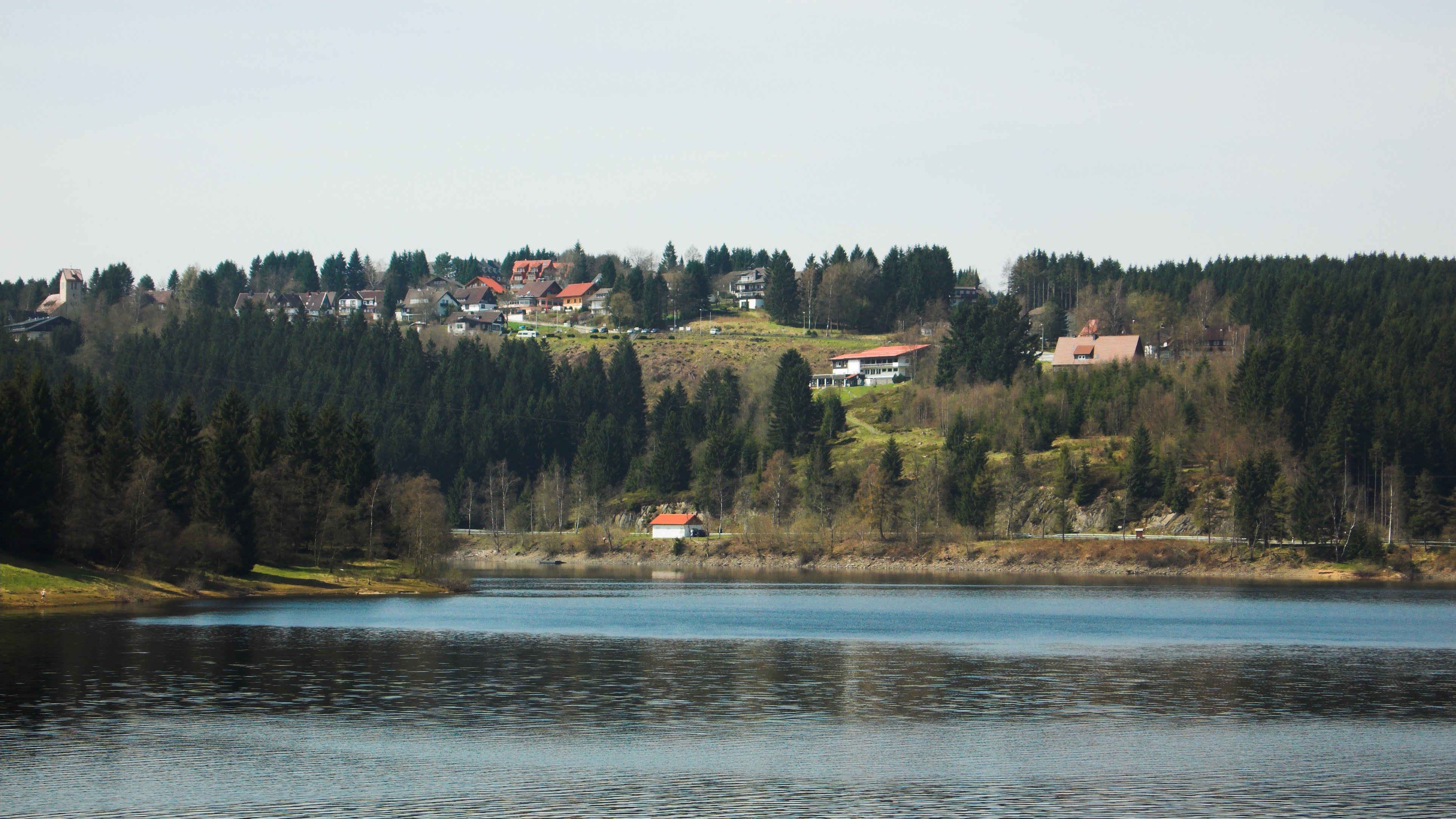 Blick von der Okertalsperre (Weißwasserbrücke) nach Schulenberg